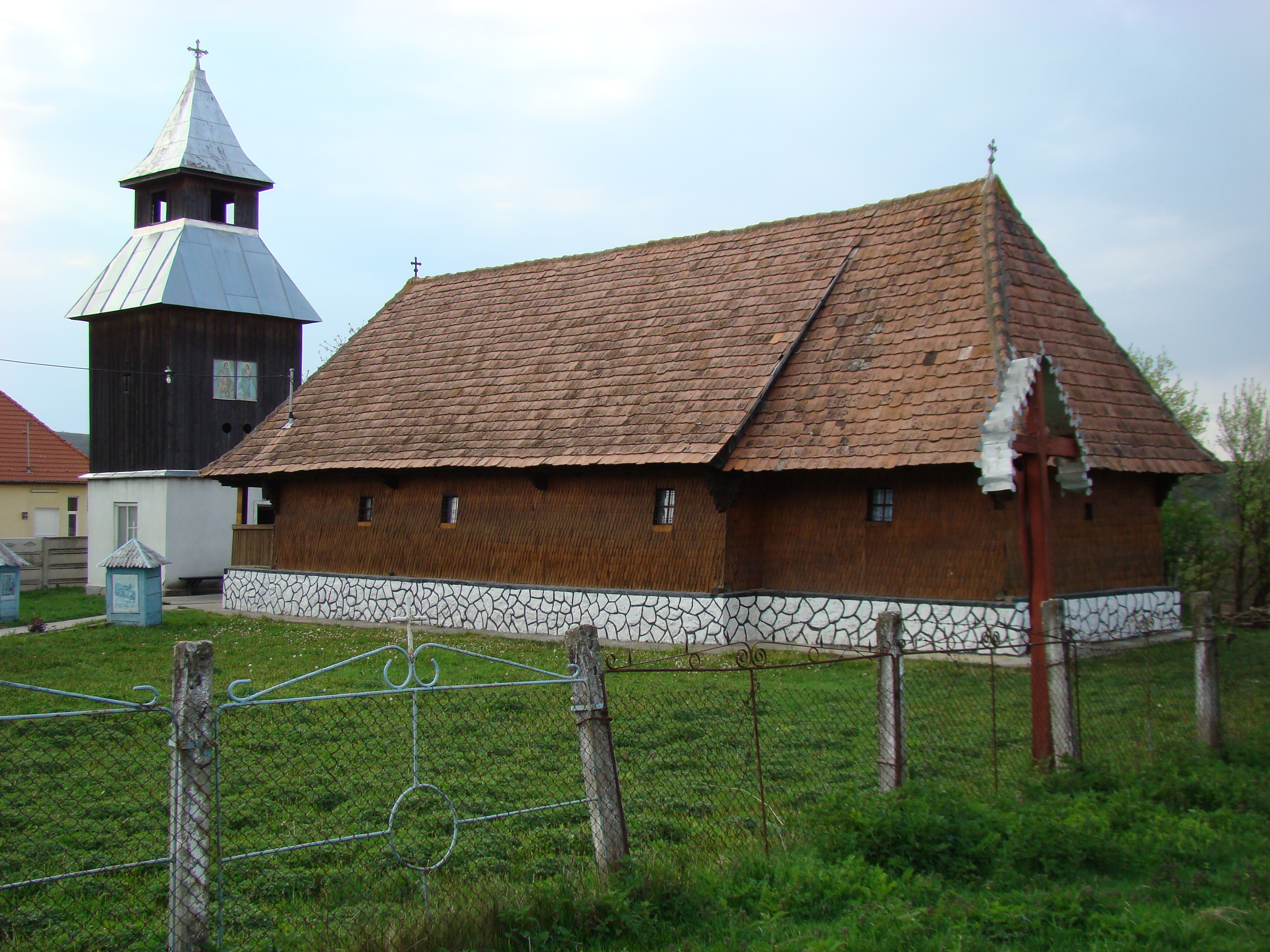 Biserica de lemn din Fărău